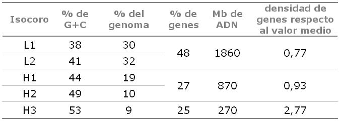 Tabla que resume la riqueza en G+C y genes de los principales isócoros, en el genoma humano. Creación propia de dominio público.